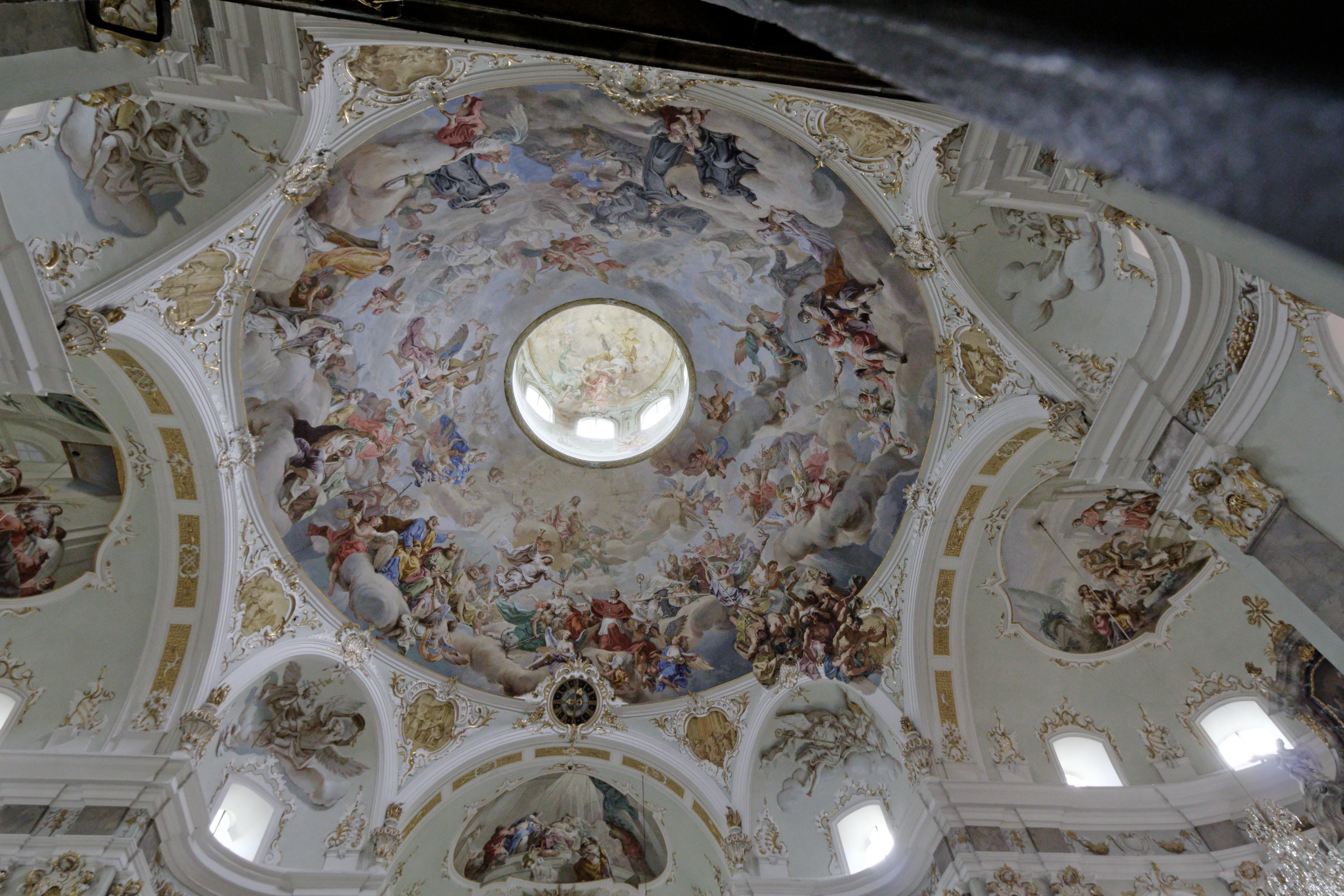 Volders (Tirol) Karlskirche; Blick in die Kuppel